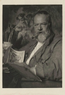 Rudolf von Seitz, Frank Eugene [Smith], um 1907, Photogravüre auf Japanpapier, undat., sign. o. l., 168 x 121 mm (Platte), 196 x 132 mm (Blatt), 287/292 x 206 mm (Untersatz), Staatliche Graphische Sammlung München, Inv.-Nr. 1935:946 D